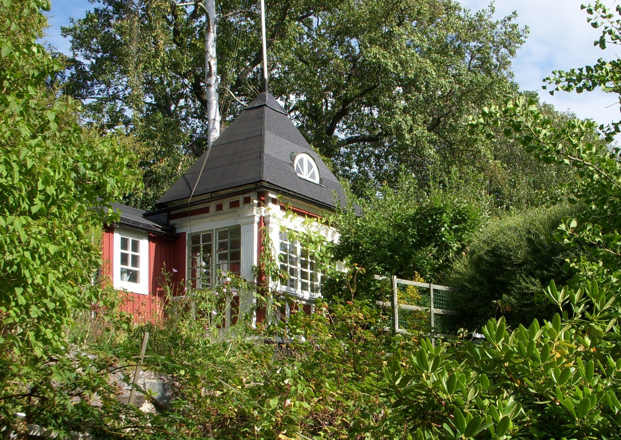 Eriksdalslunden på Södermalm i Stockholm, lott nr 1A: Paviljongen från Stockholmsutställningen 1897